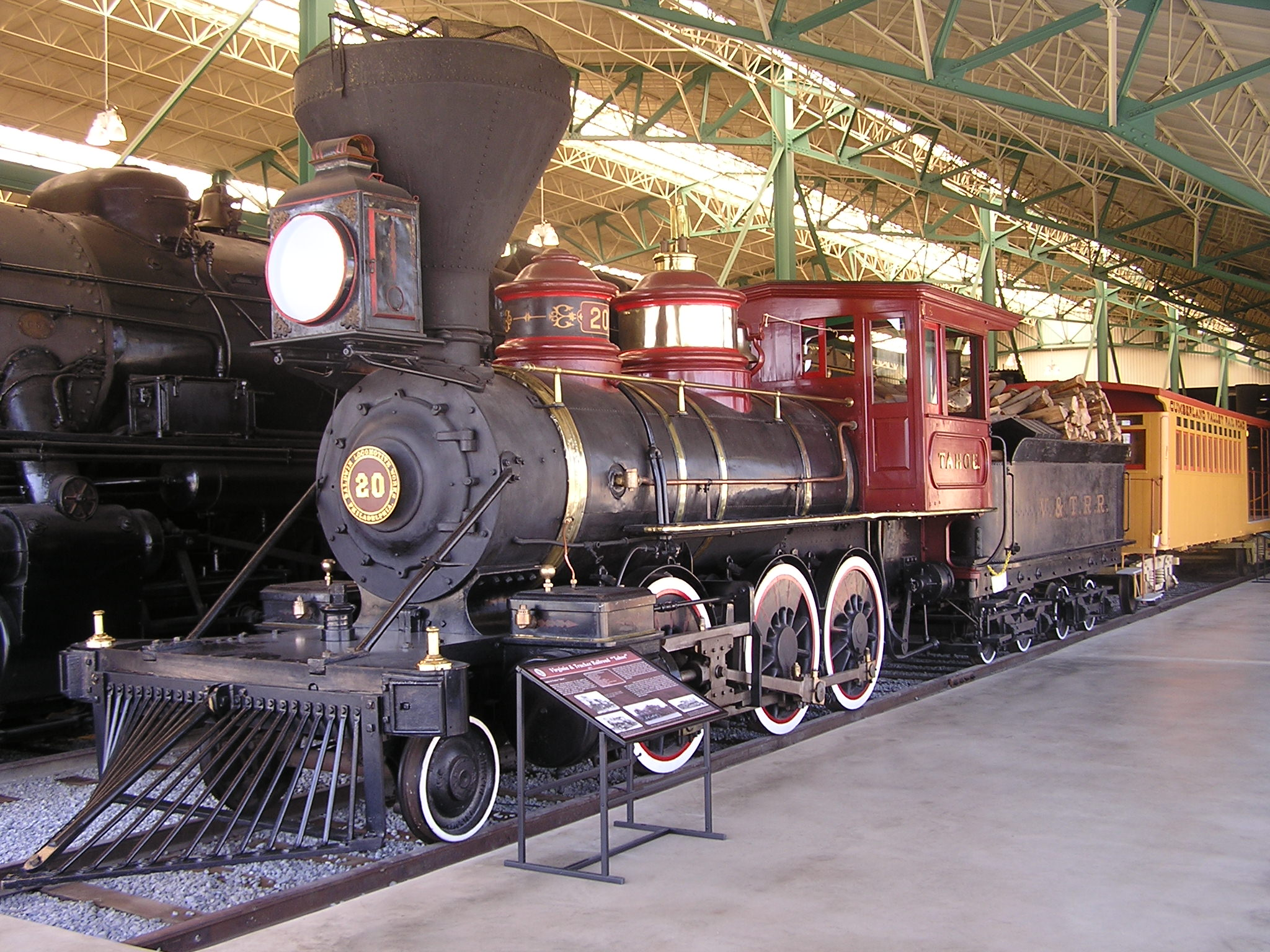 Virginia & Truckee "Tahoe", 1875 - Pennsylvania Railroad Museum Strasburg